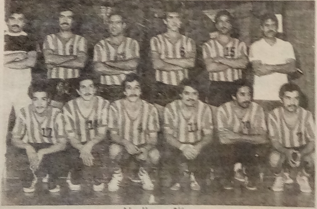 Assabah 1980